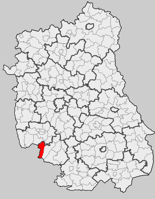 Map of gmina Potok Wielki, Janów Lubelski county, Lublin voivodship Mapa gminy Potok Wielki, powiat janowski, województwo lubelskie